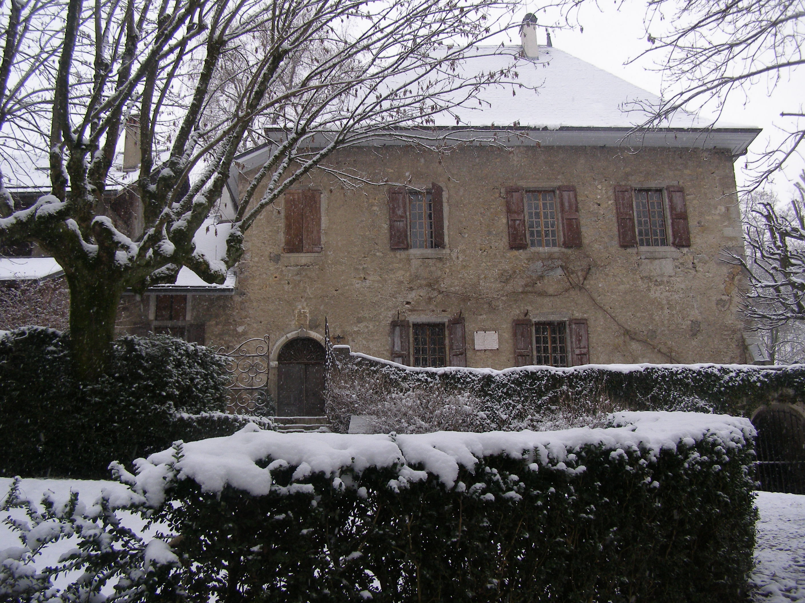 Les Charmettes